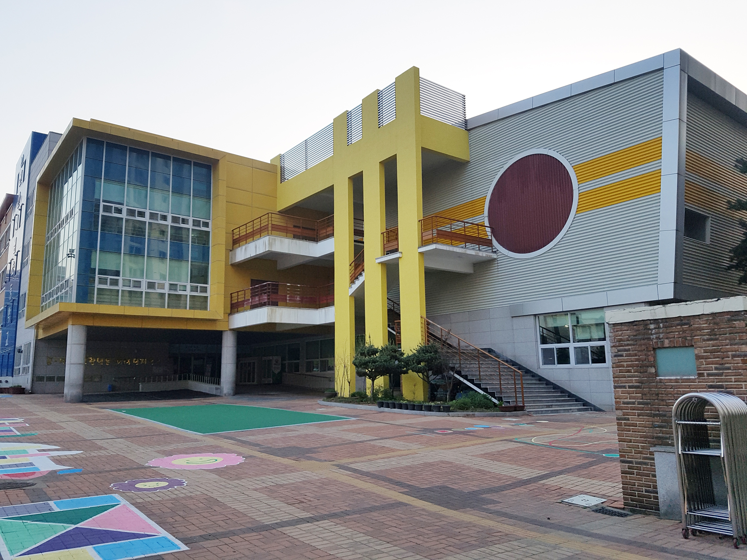 천안새샘초등학교